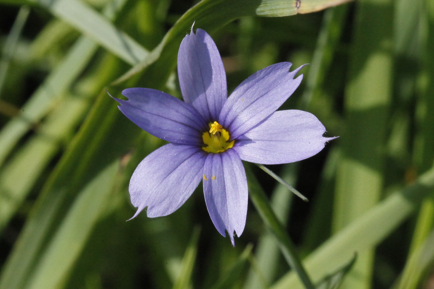 Sisyrinchium des Bermudes, Mouthe (25)